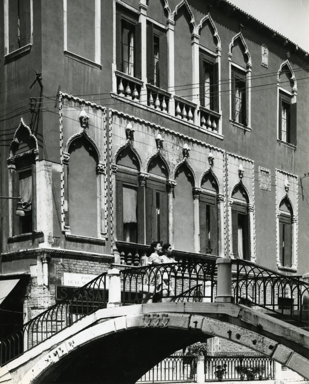 Servizio fotografico : Venezia, 1969 / Paolo Monti. - Stampe: 4 : Positivo b/n, gelatina bromuro d'argento/ carta, 24x30. - ((Al verso delle stampe manoscritti i numeri dei negativi corrispondenti: 14628, 14633, 14656, 15099; iscrizioni didascaliche manoscritte a matita; timbro a inchiostro con copyright (Via Tasso - Milano). - Sul coperchio della scatola iscrizione didascalica manoscritta a pennarello nero: "Venezia gotica". - Occasione: Documentazione per la pubblicazione: Arslan Edoardo, "Venezia gotica: architettura civile gotica veneziana", Milano, Electa, 1970. - Fonte: Monografia di Arslan, Edoardo: Venezia gotica: architettura civile gotica veneziana, Milano, Electa (1970)